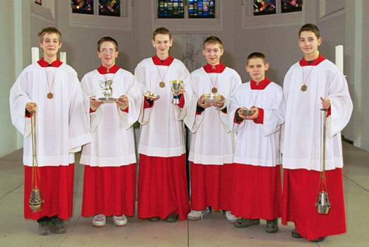 Meßdiener der katholischen Pfarrgemeinde St. Peter Viersen-Bockert mit Weihrauchfass, Kännchen für Wein bzw. Wasser, Kelch, Hostienschale.